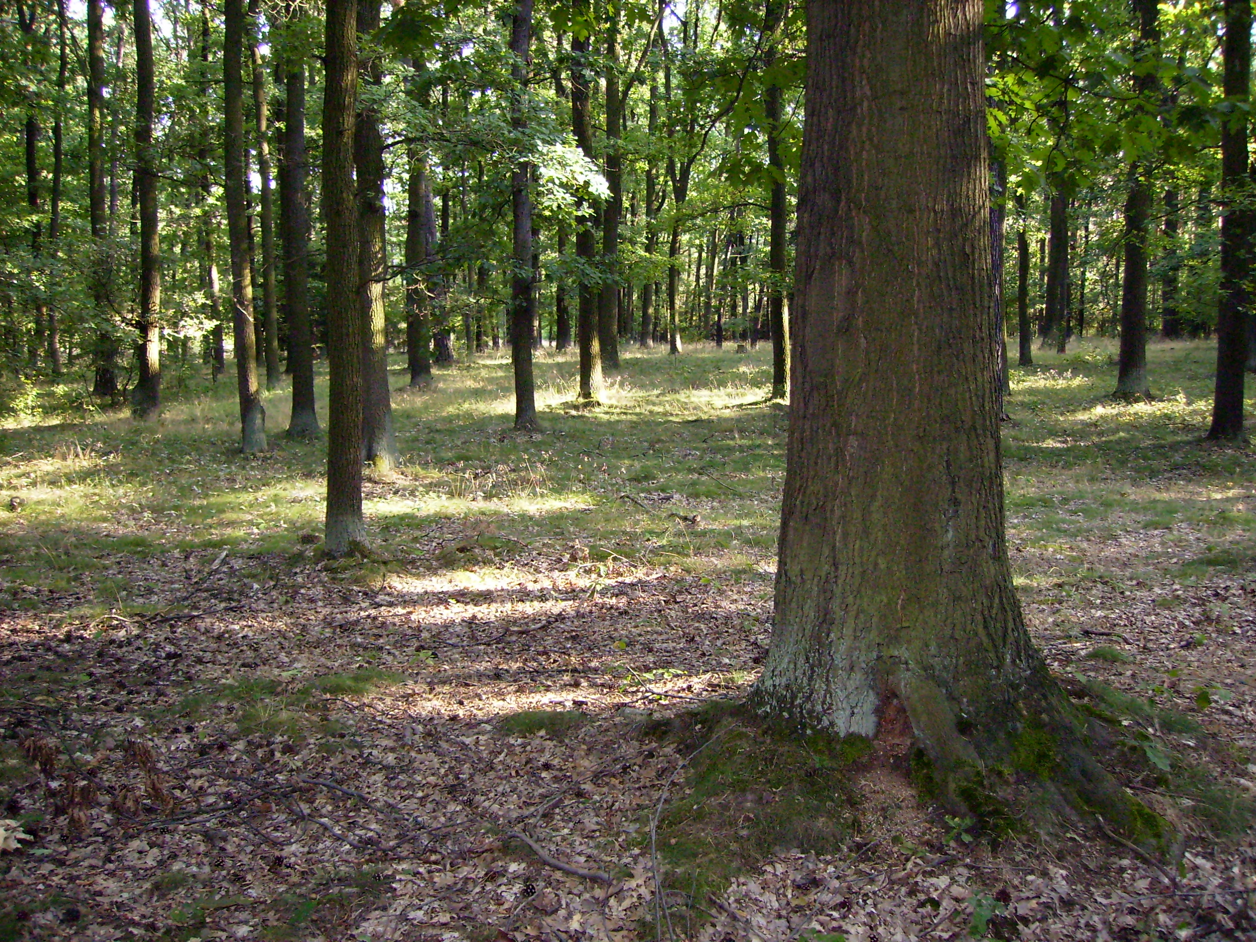 Přírodní rezervace v Klánovickém lese